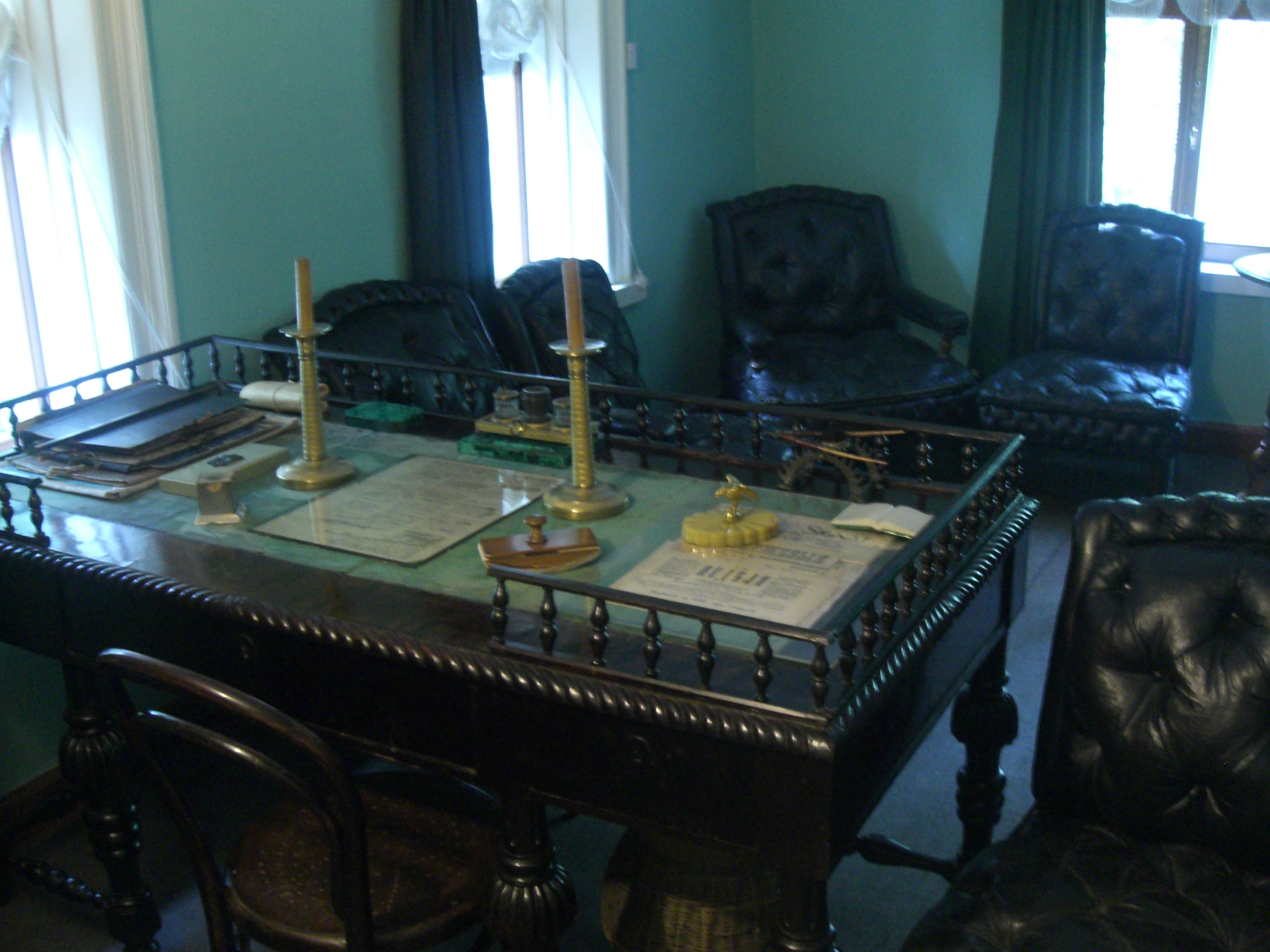 Стол в рабочем кабинете Льва Николаевича Толстого в мемориальном музее-усадьбе "Хамовники"